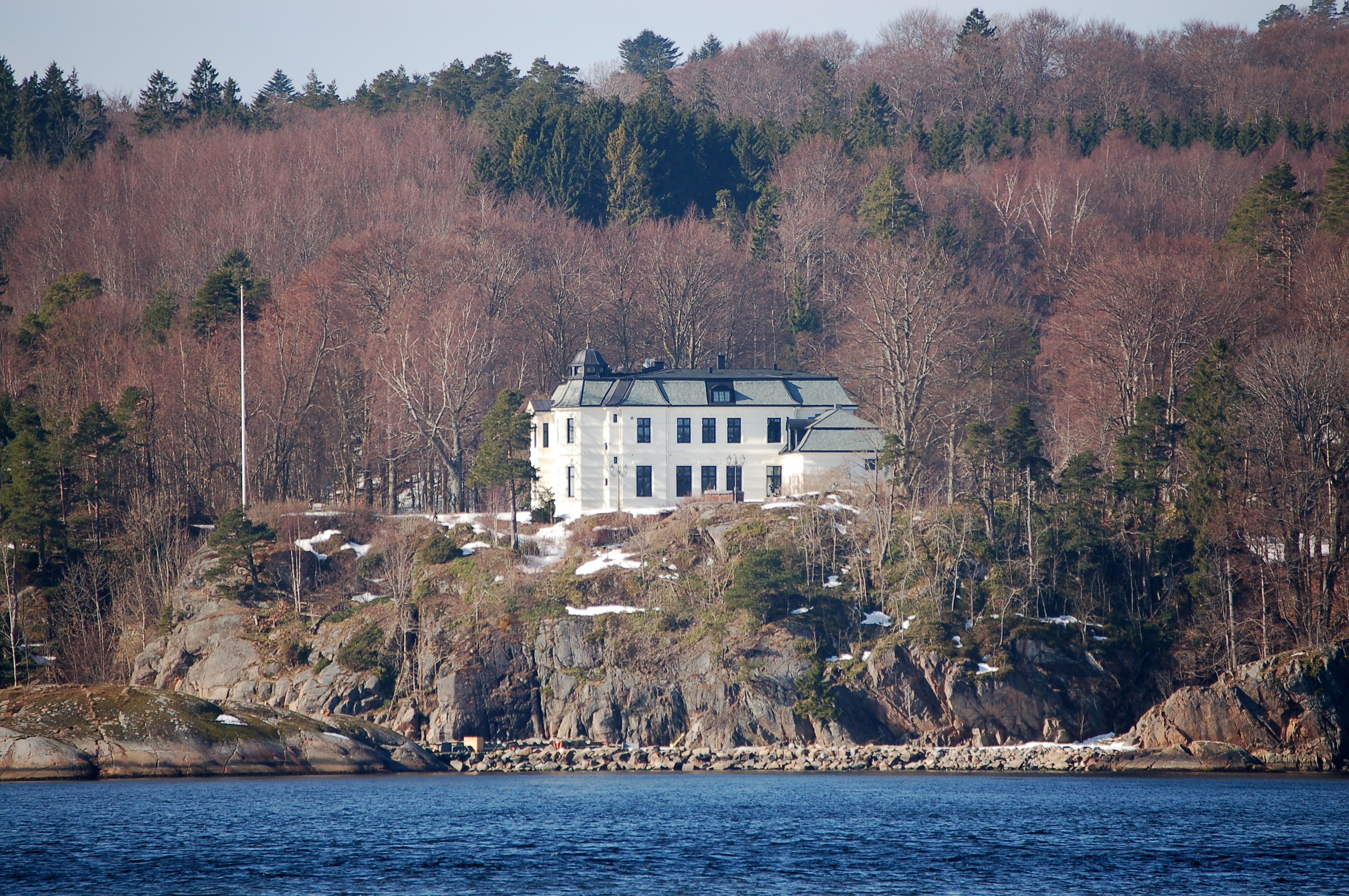 Balders hage i Larvik, Norway